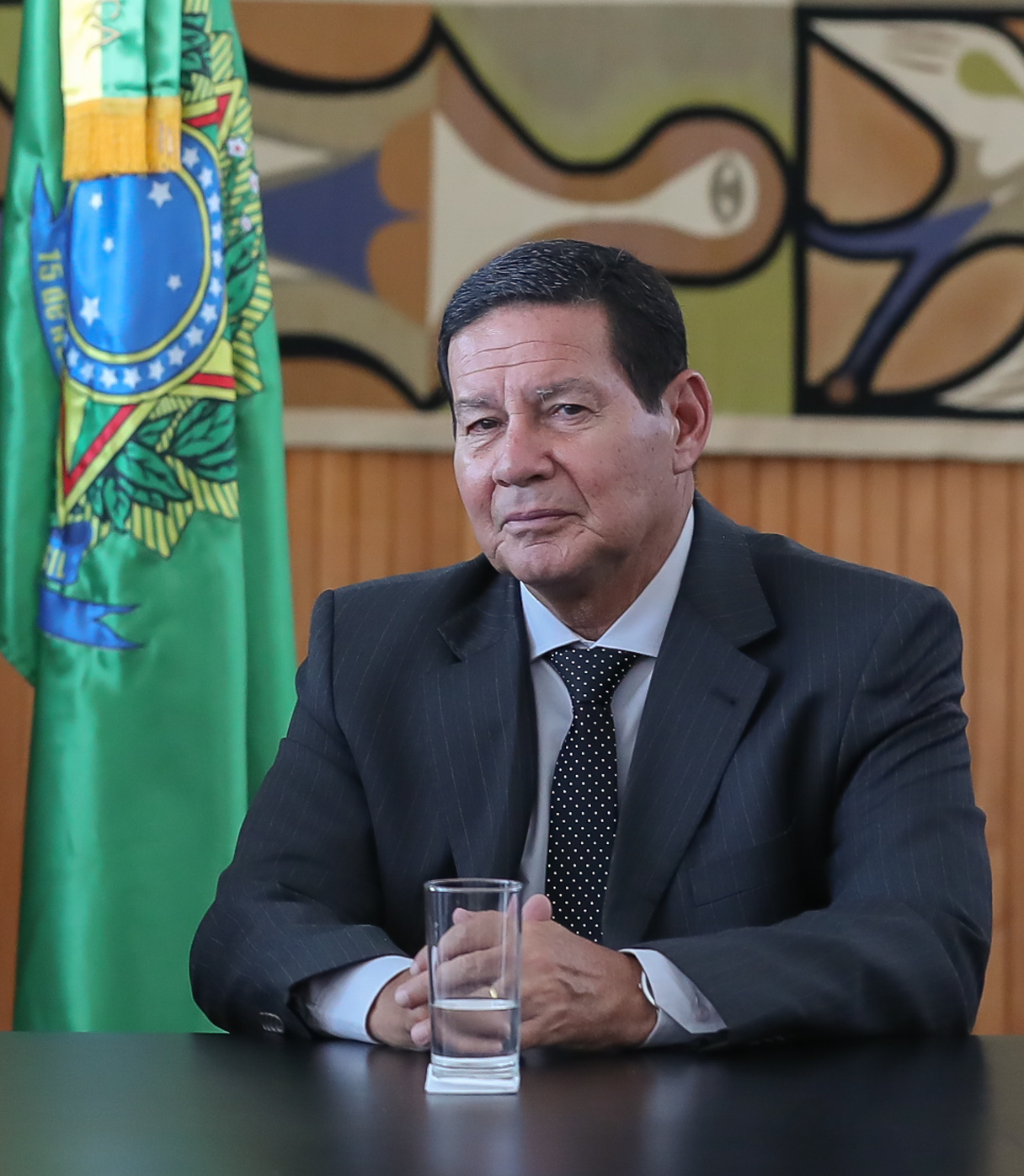 (Brasília - DF, 17/09/2019) Presidente da República, Jair Bolsonaro durante a solenidade de sanção da Lei 3715/19, que altera o estatuto do desarmamento. Foto: Marcos Corrêa/PR